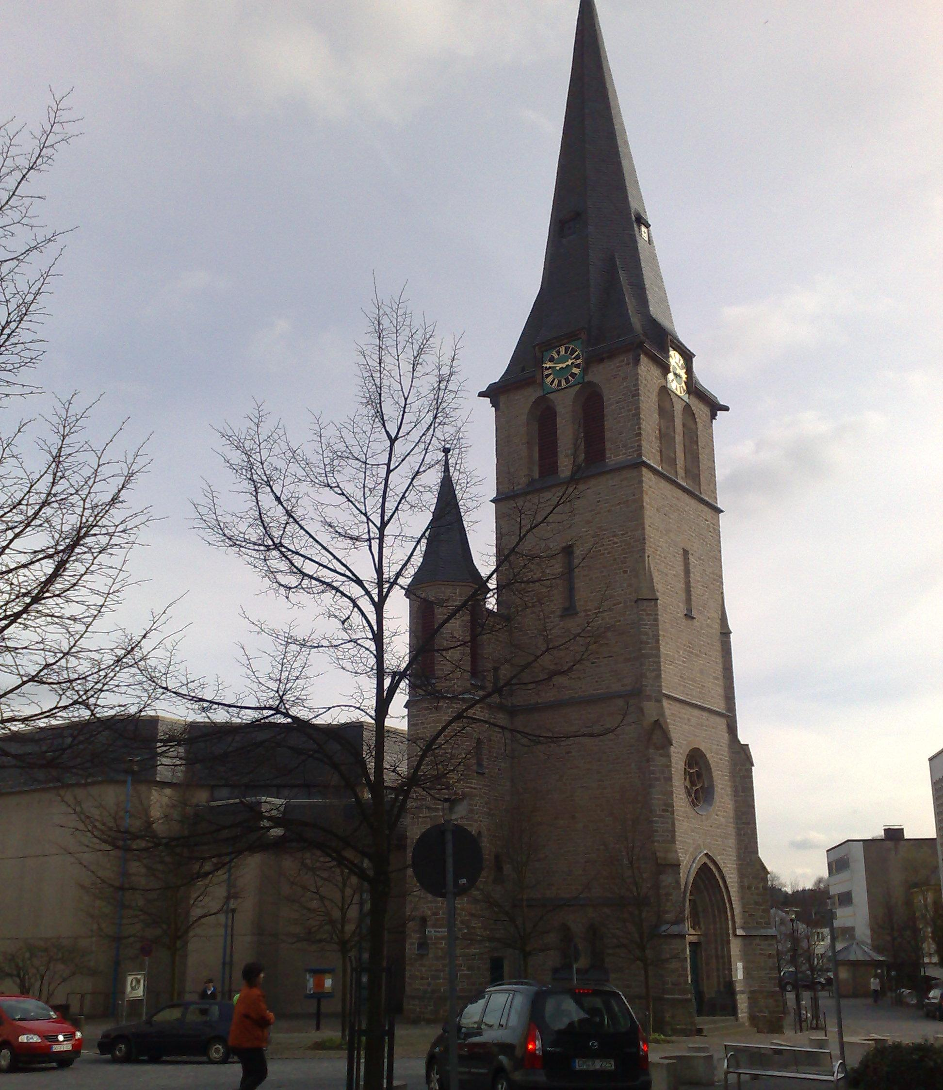 Sankt-Franziskus-Kirche Gummersbach